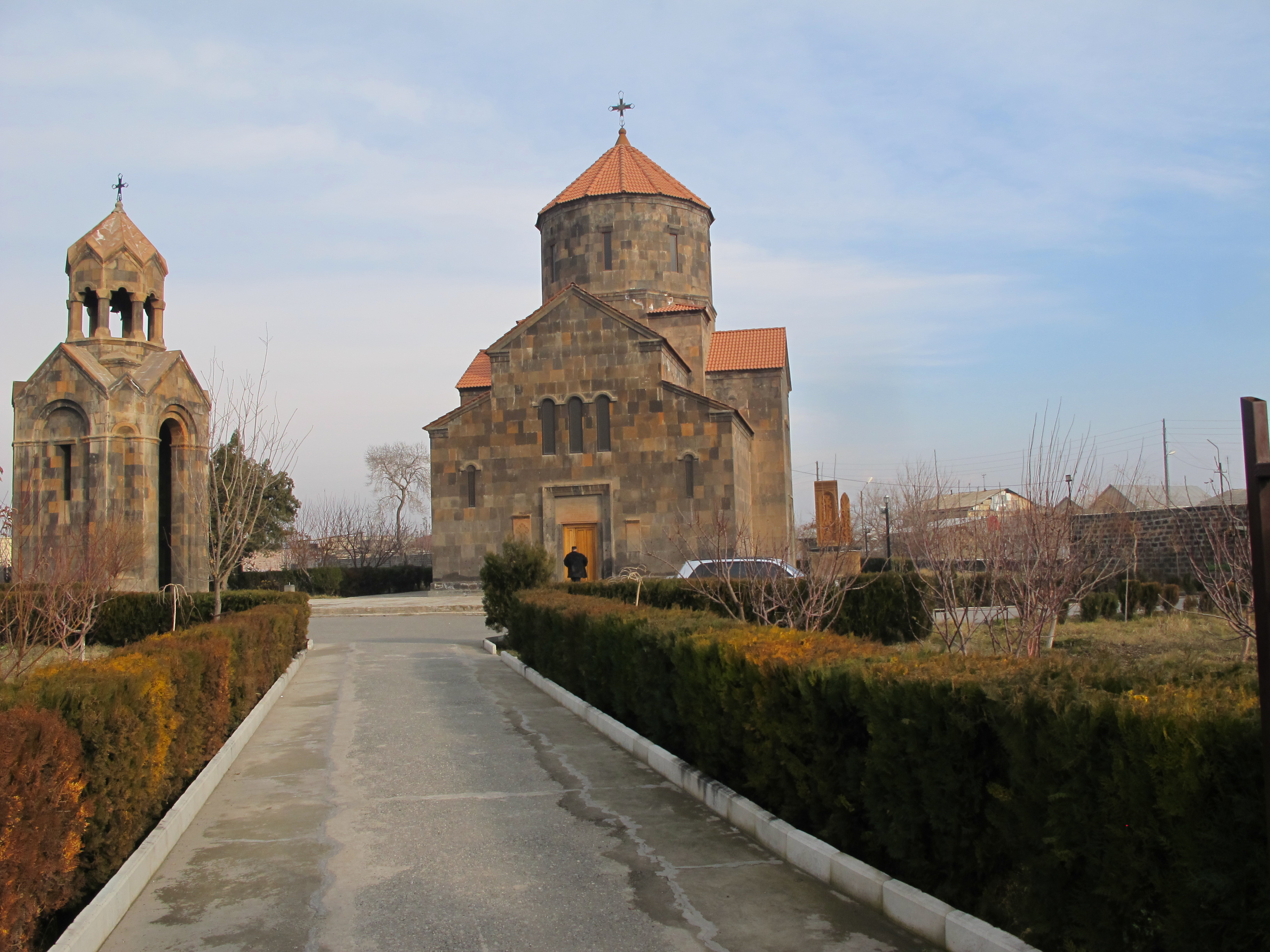 Ներքին Չարբախի Սուրբ Խաչ եկեղեցին